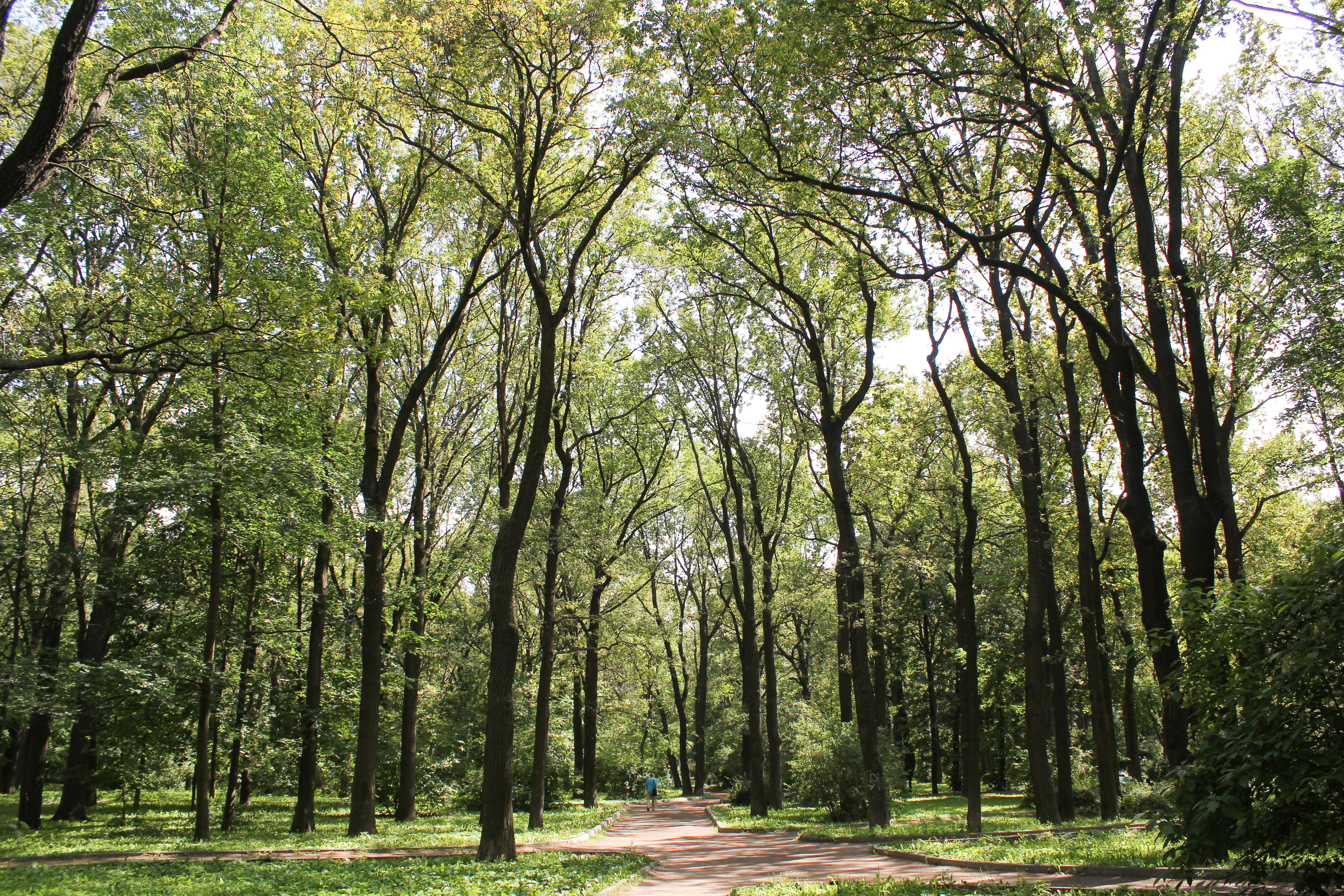 В парке Дубки